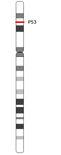 Position du gène p53 sur le chromosome 17